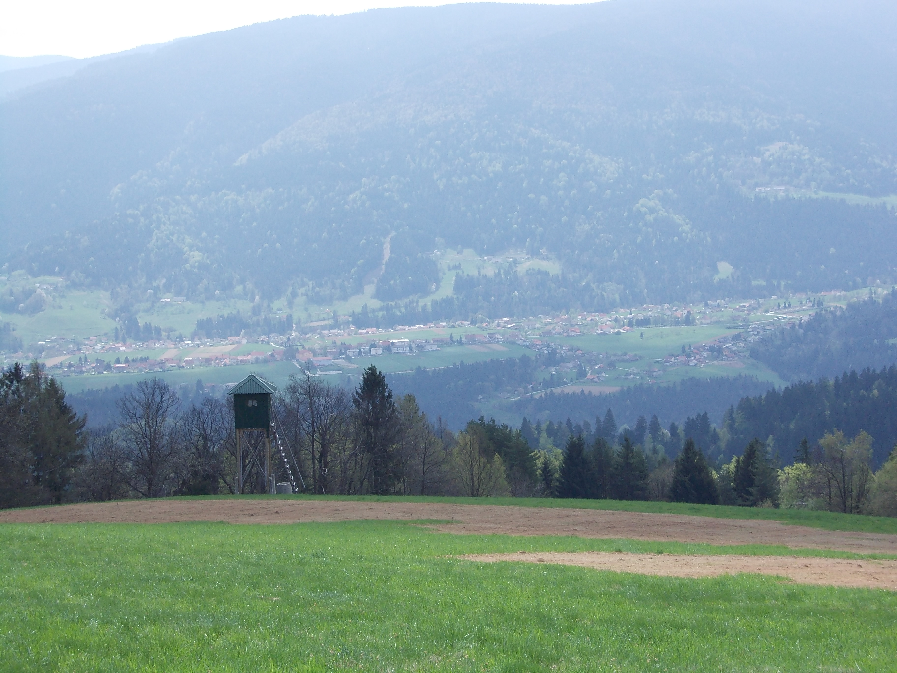 Lovrenc na Pohorju, from Lovska koča, Rdeči Breg